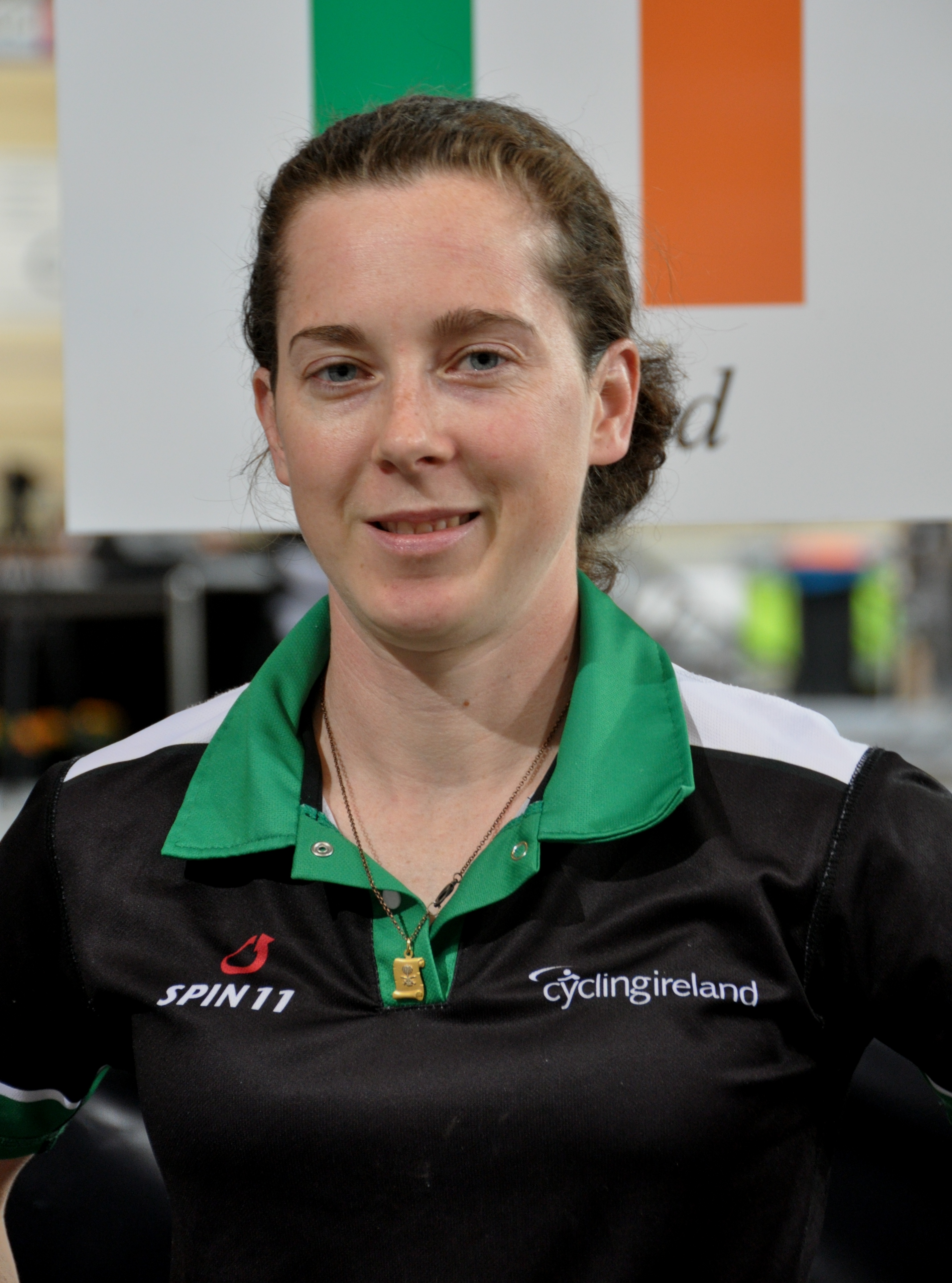 Lydia Gurley, irische Radsportlerin